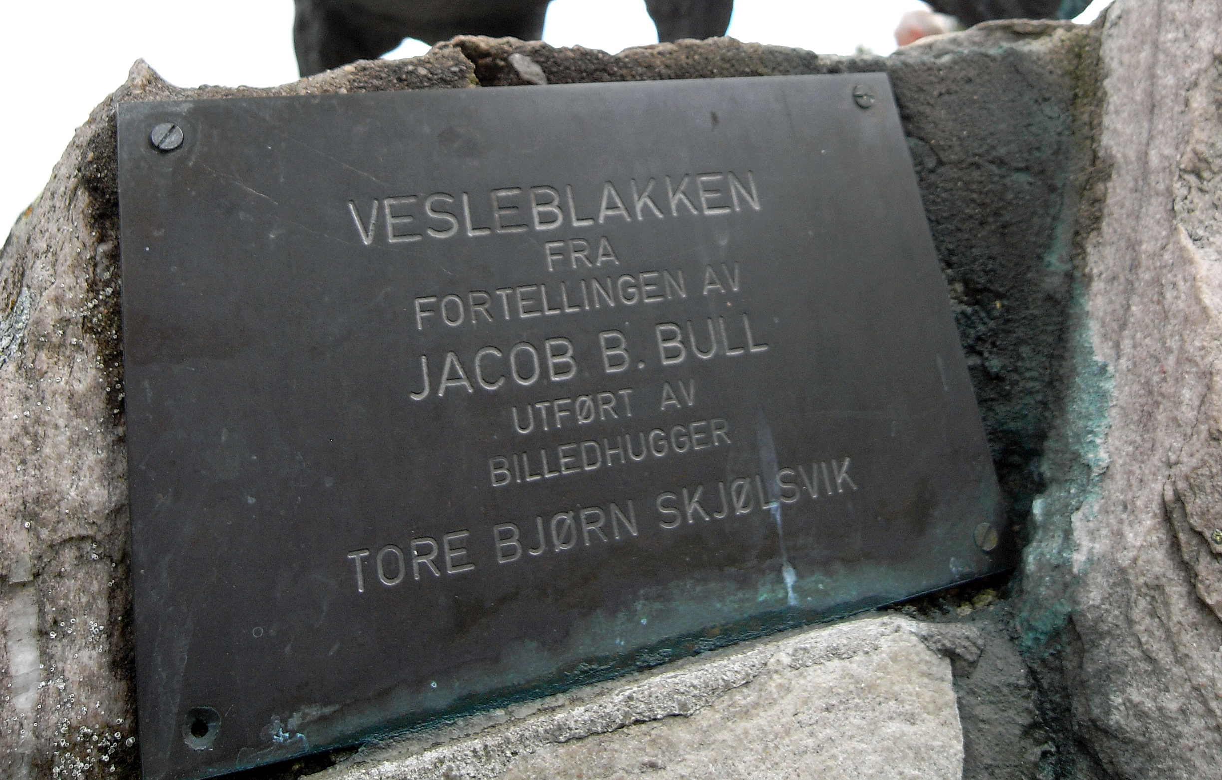 Detalj fra statue av Vesleblakken, fra en fortelling skrevet av Jacob Breda Bull, på Rendalen folkemuseum. Kunstneren er Tore Bjørn Skjølsvik. Foto: Ram Gupta 2010